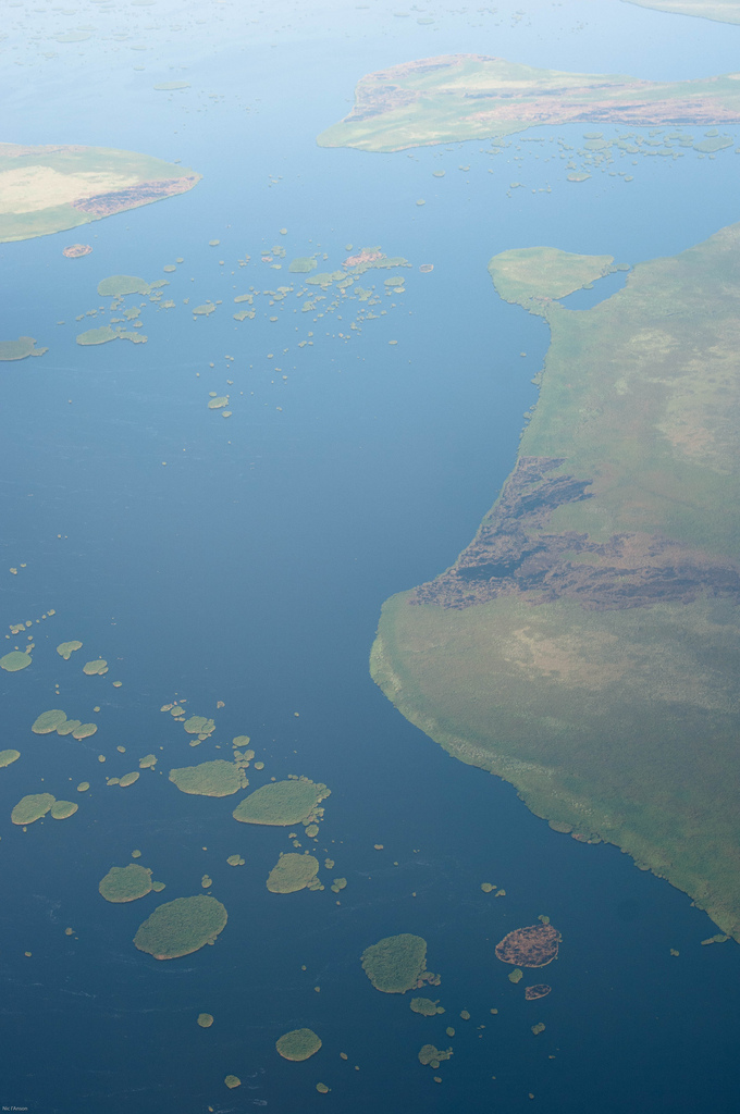 Поглед към езерото Кьога, Уганда